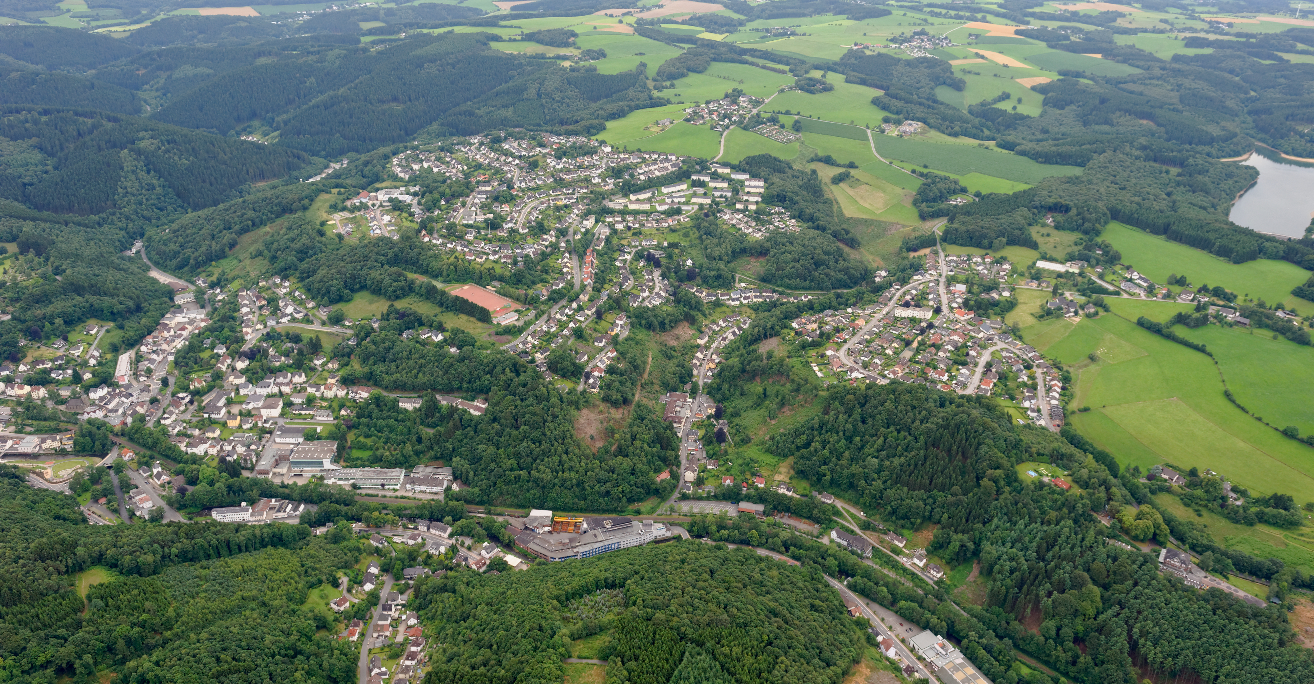 The making of this document was supported by the Community-Budget of Wikimedia Germany. Übersicht der Kernstadt von Schalksmühle mit Bundesstraße 54, Bahnstrecke Hagen–Dieringhausen im Volmetal; rechts Glörtalsperre